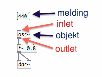 Skjermbilde tatt fra PD-extened 0.41.4